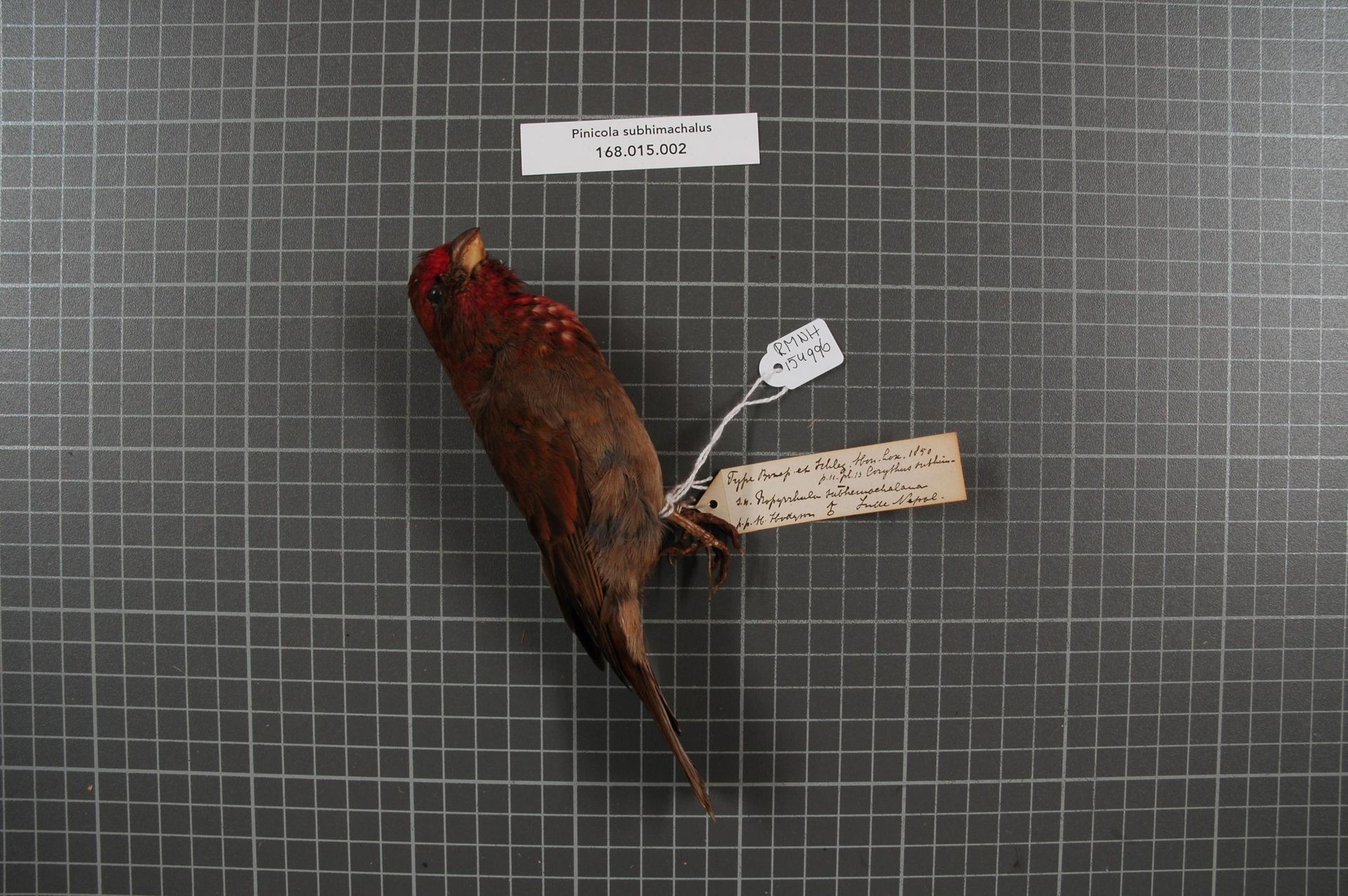 Pinicola subhimachalus (Hodgson, 1836)